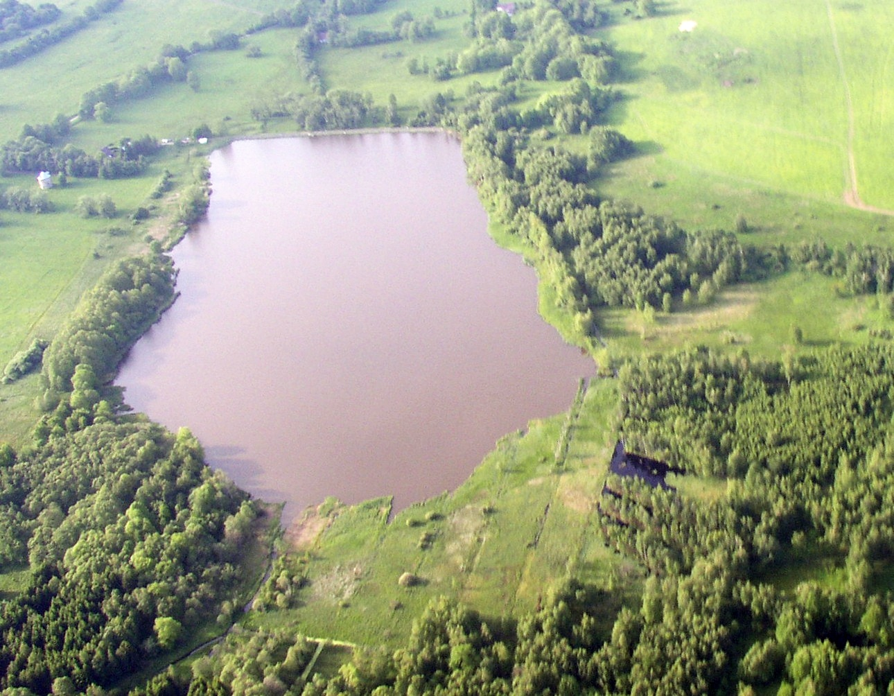 Letecký pohled na rybník Světlík, 3. červen 2006